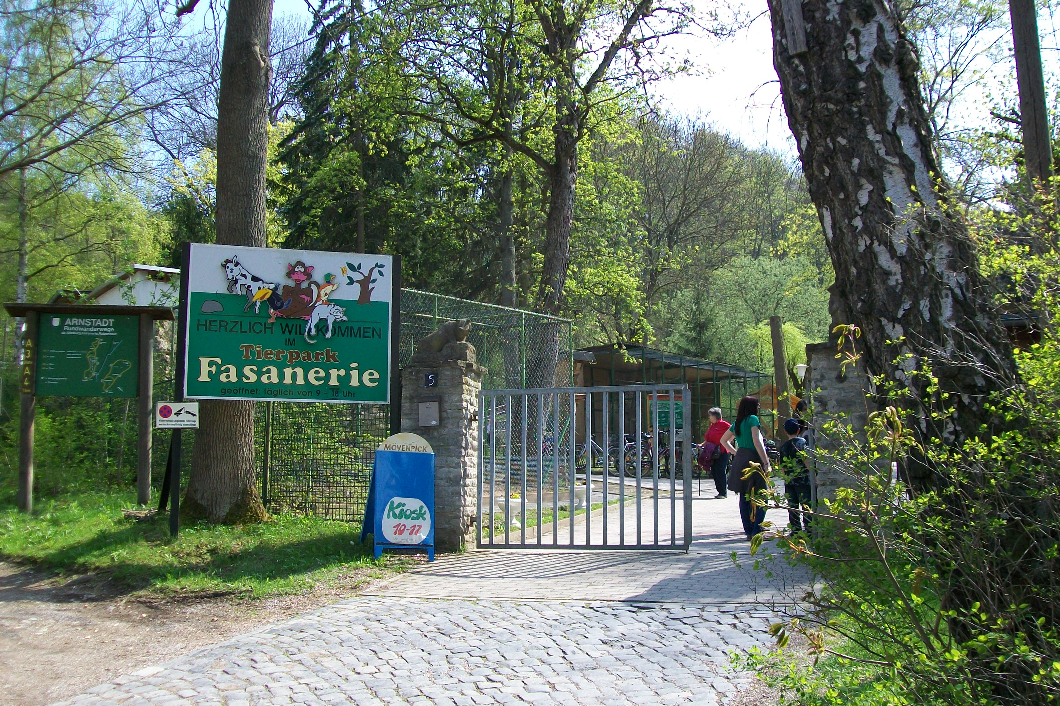 Fasanerie Arnstadt, EingangEsperanto: Enirejo al la ĝardeno zoologia de Arnstadt (Germanio).